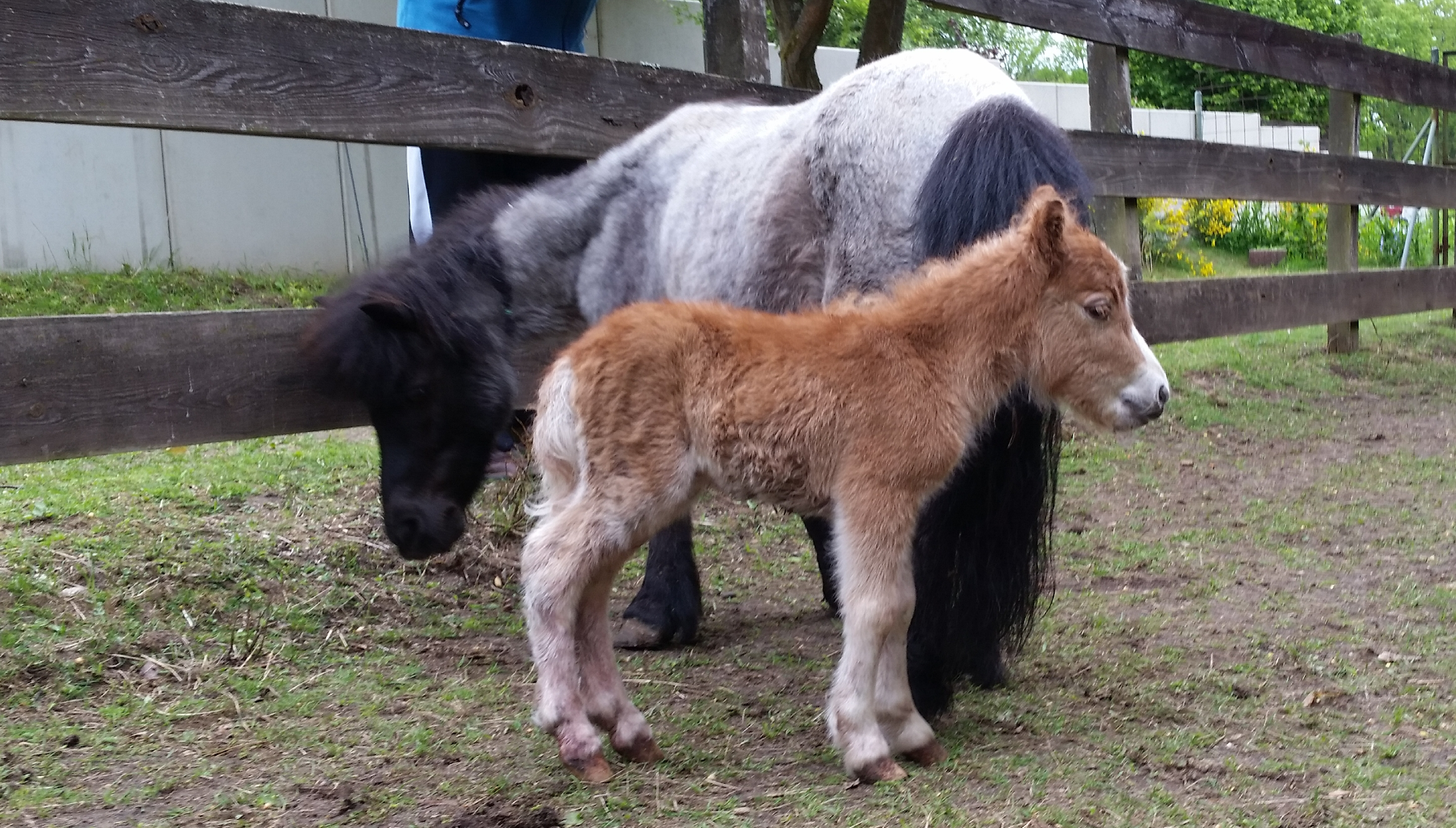 Shetlandpony mit Fohlen